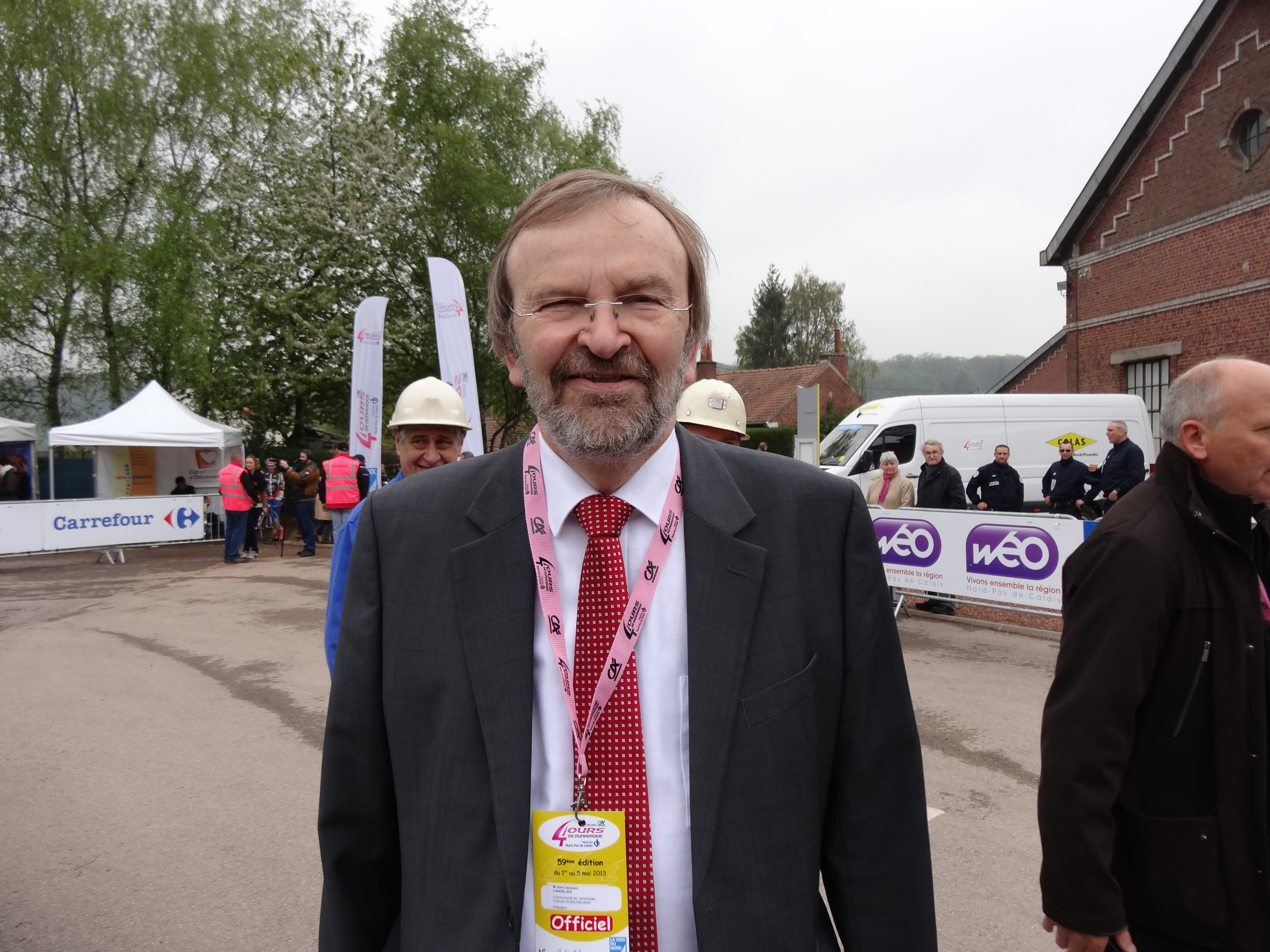 Reportage photographique réalisé le jeudi 2 mai 2013 au départ de la deuxième étape de l'édition 2013 des Quatre jours de Dunkerque au Centre historique minier de Lewarde, Nord, Nord-Pas-de-Calais, France, dans le bassin minier du Nord-Pas-de-Calais. Depicted person: Jean-Jacques Candelier